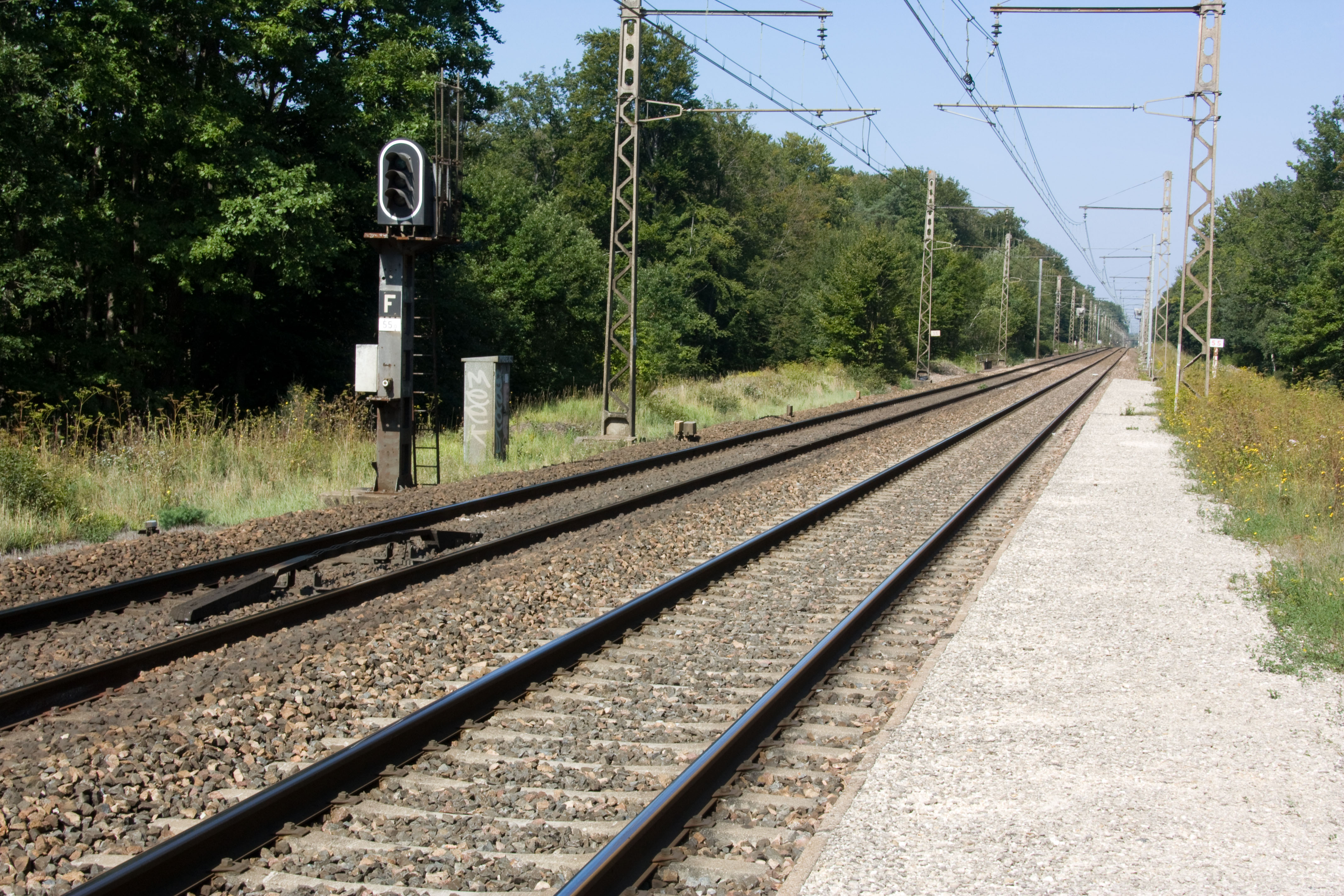 Halte de Fontainebleau - Forêt, Fontainebleau, Seine-et-Marne, France